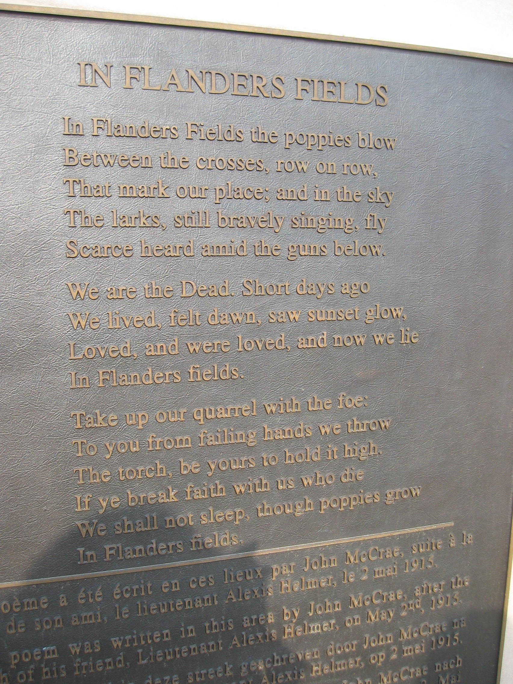 West-Vlams: Foto door Tim Bekaert, Essex Farm Cemetery, Ieper.